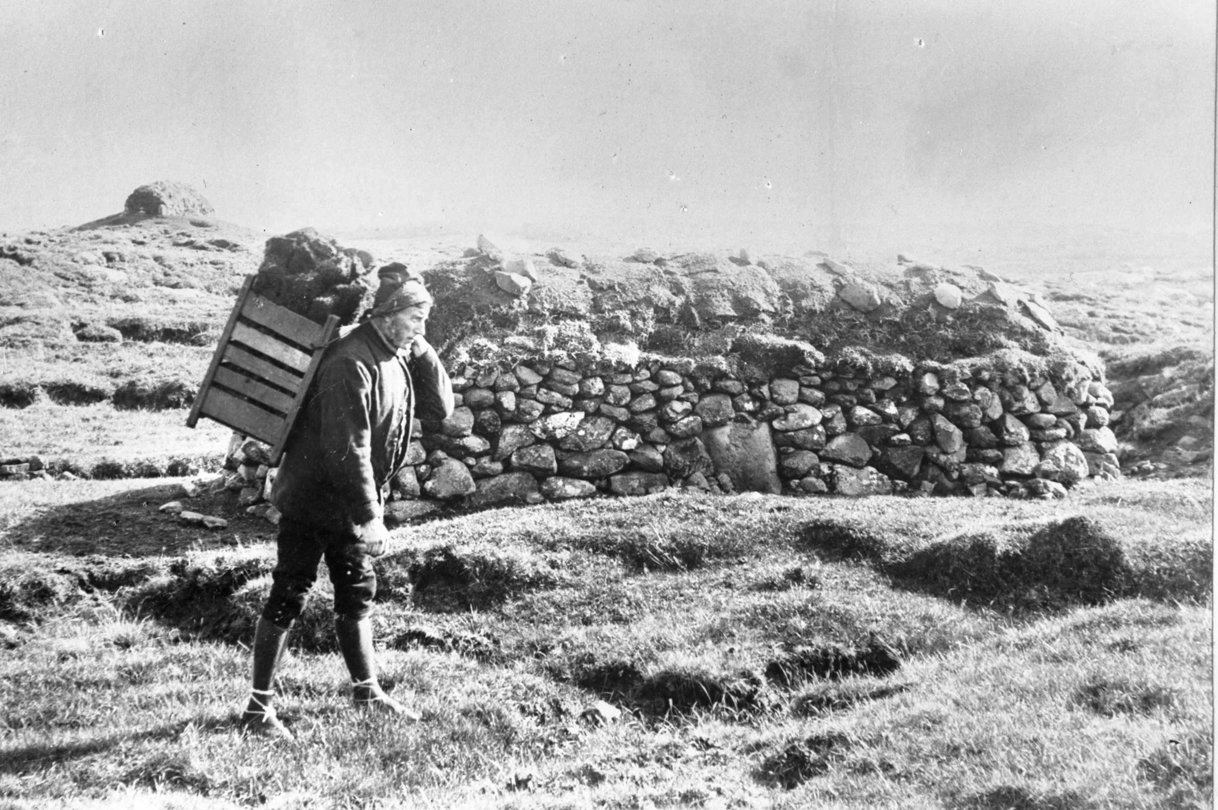 Gammel mann bærer torv på Færøyene.